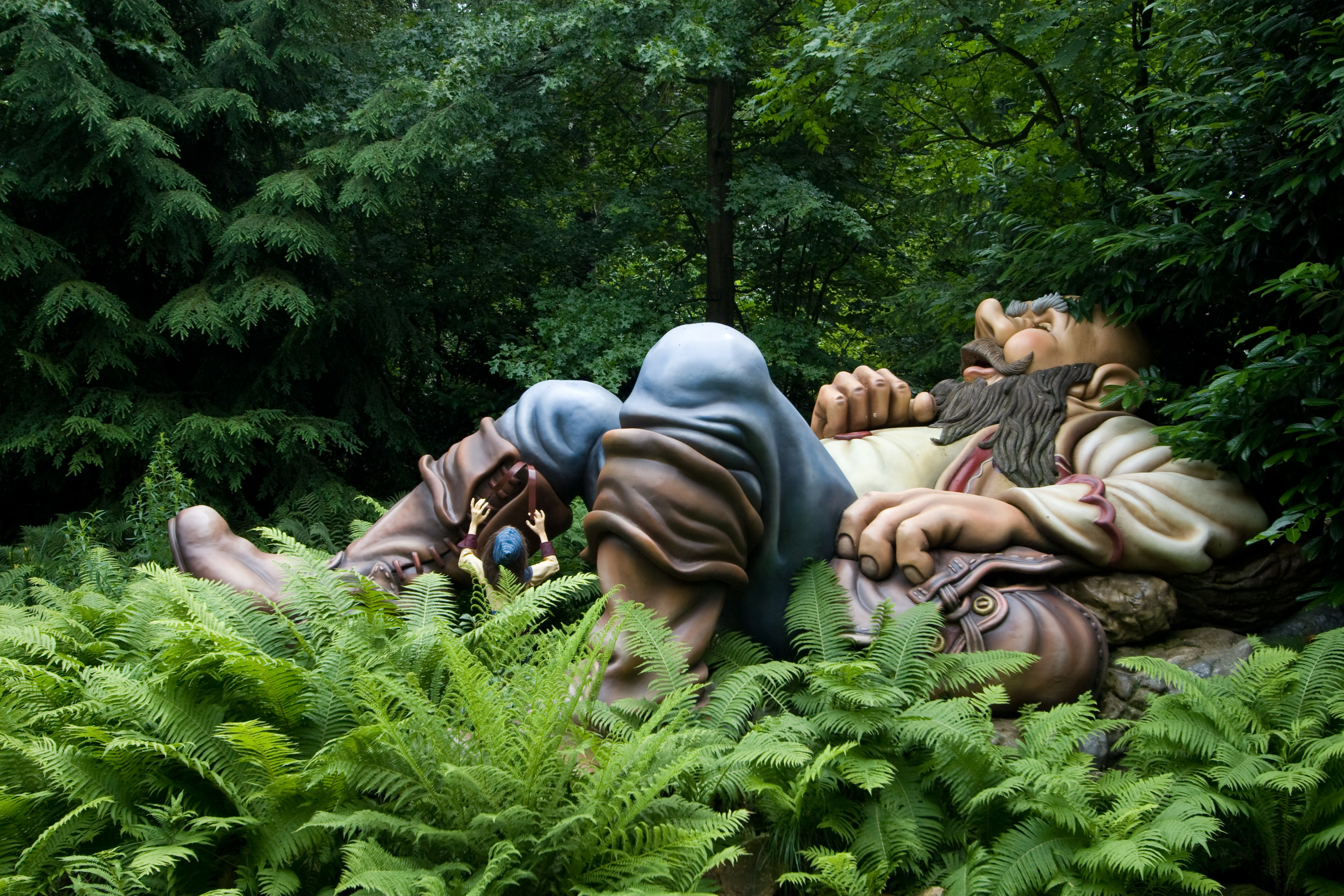 Kleinduimpje (Hop-o'-My-Thumb) in de Efteling